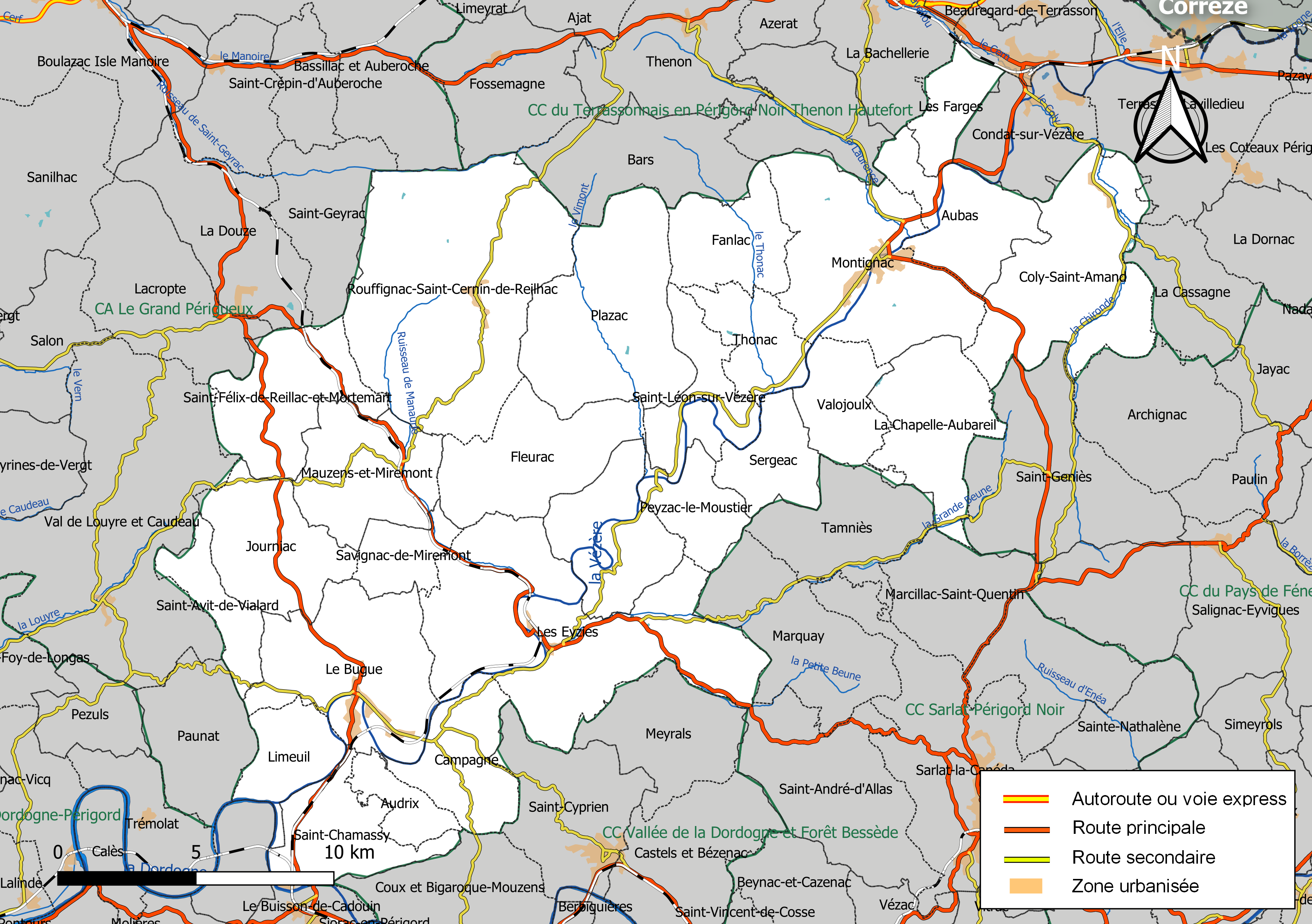 Carte géographique de la Communauté de communes de la Vallée de l'Homme, département de la Dordogne, France. Composition au 1er janvier 2019.